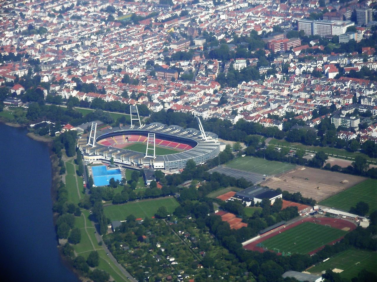 Weserstadion in Bremen, aus einem Flugzeug gesehen.